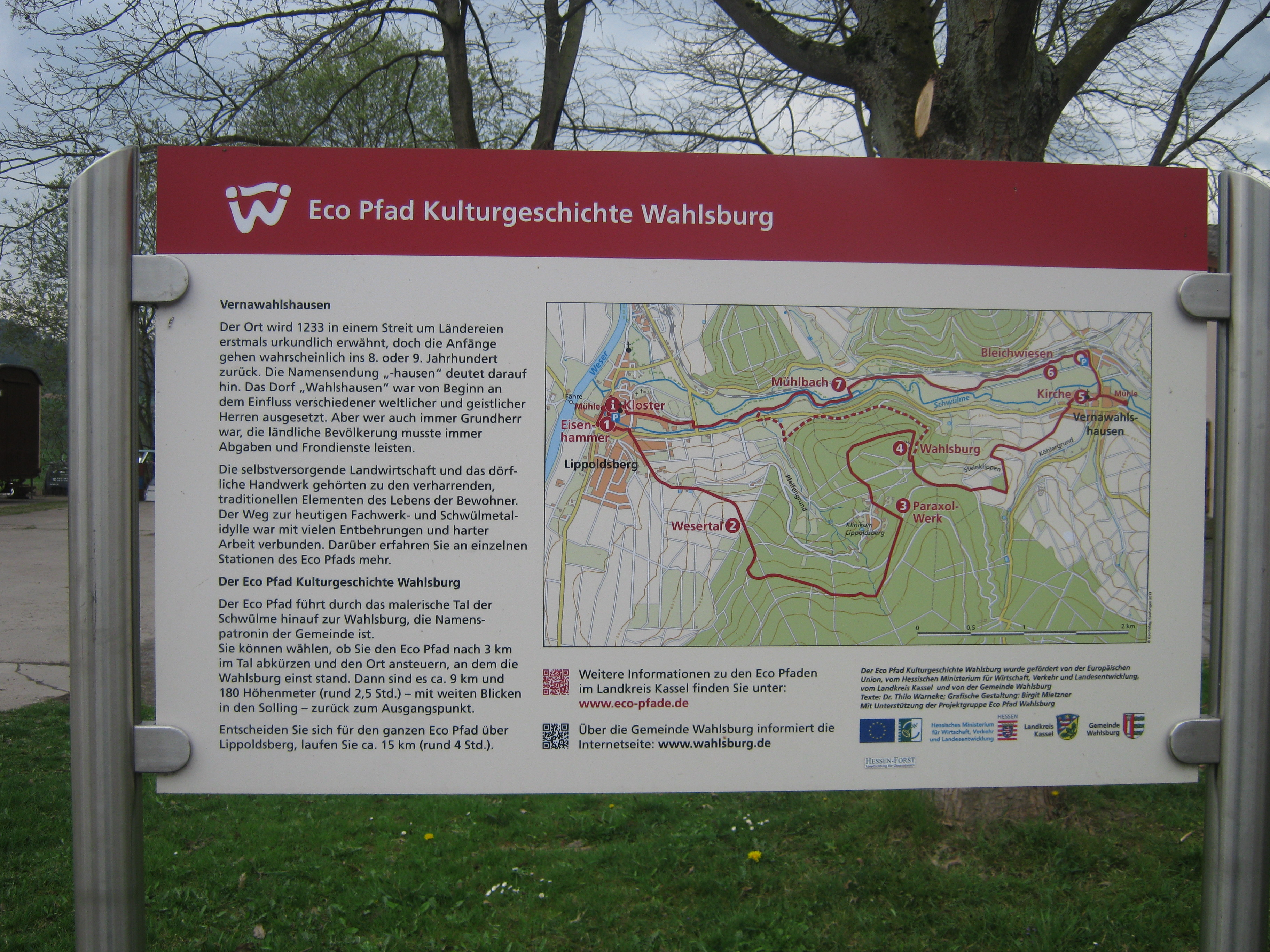 Erläuterungstafel des Eco Pfad Kulturgeschichte Wahlsburg zur Geschichte von Vernawahlshausen (Standort: Schwülmetalhalle).